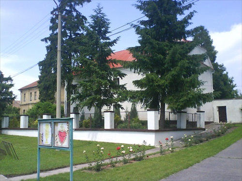 fara komjatice